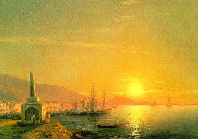 Картина "Феодосийский залив (Восход солнца в Феодосии)." Холст, масло. Оригинал 82x117 см.